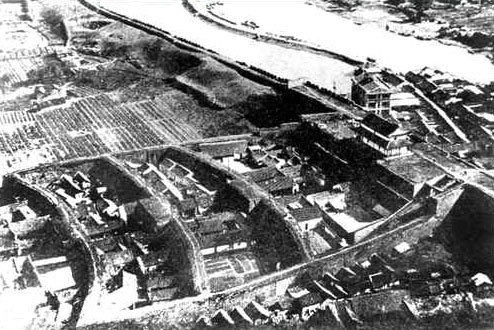 南京通济门旧影